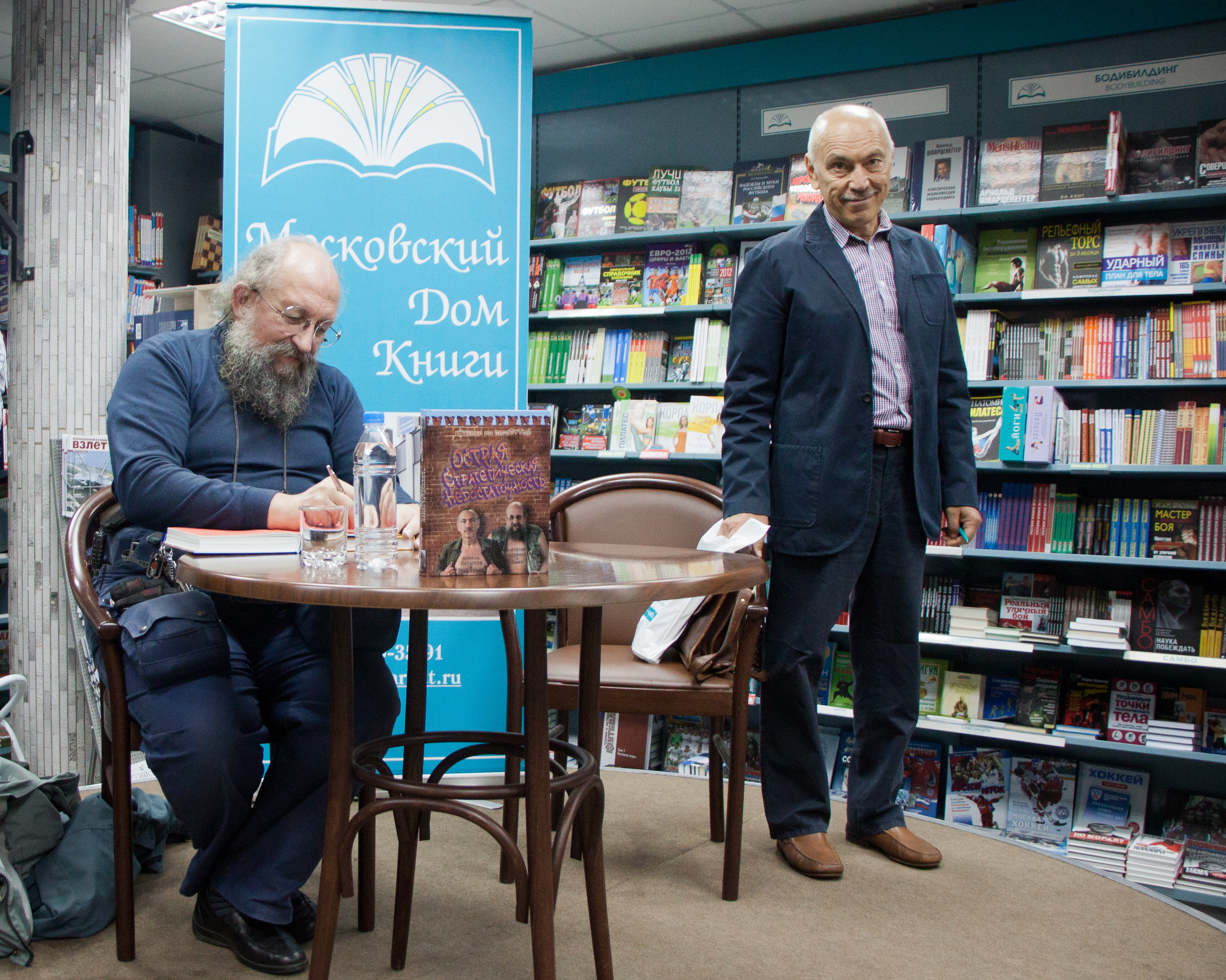 журналисты и игроки "Что?Где? Когда?" Анатолий Вассерман и Нурали Латыпов